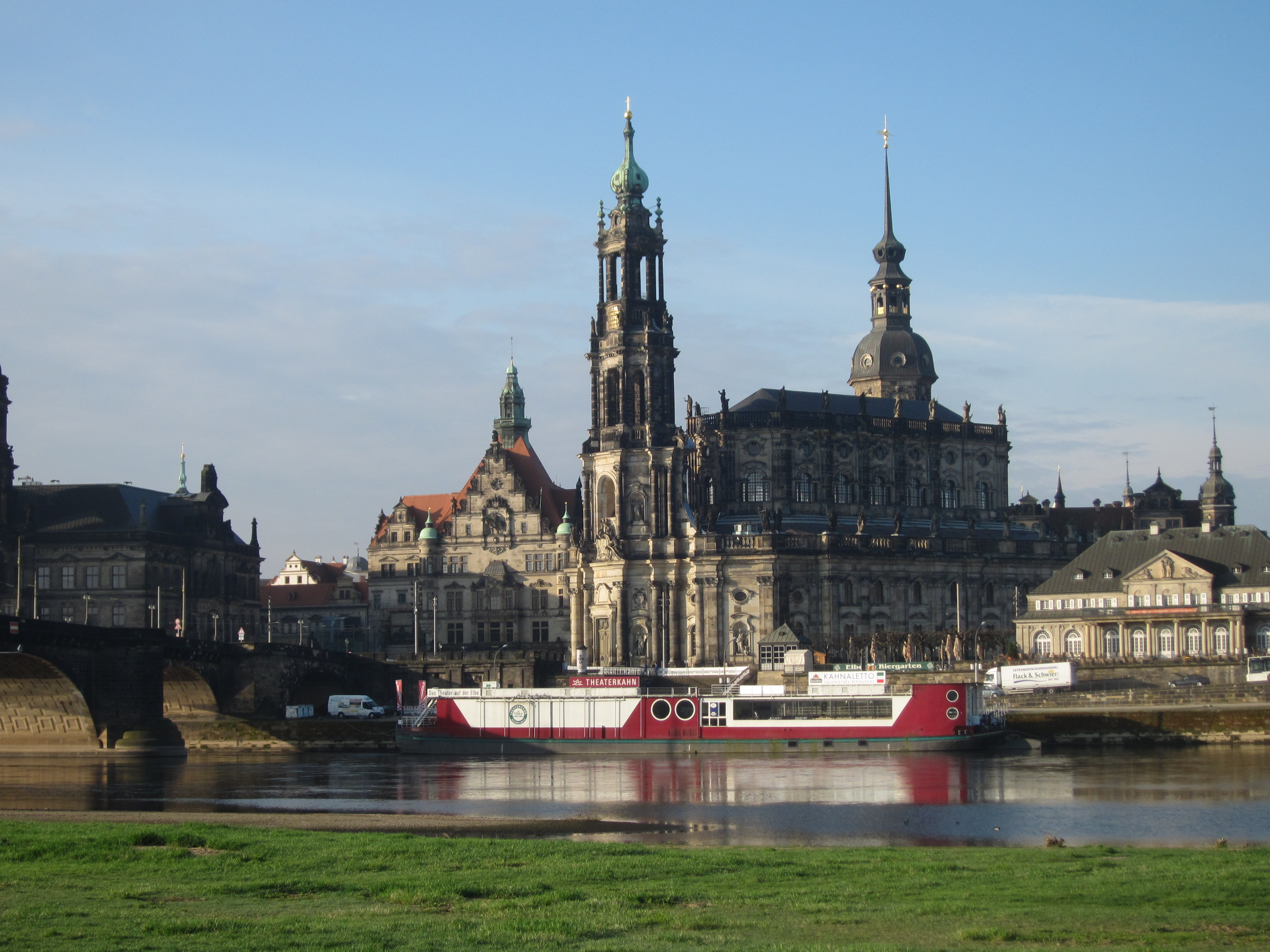 Der Theaterkahn Dresden ist der ehemalige Elbkahn Marion, der zum Theaterschiff umgebaut worden ist. Er wurde am 3. Oktober 1994 eröffnet und beherbergt das 1988 gegründete Theater Dresdner Brettl.